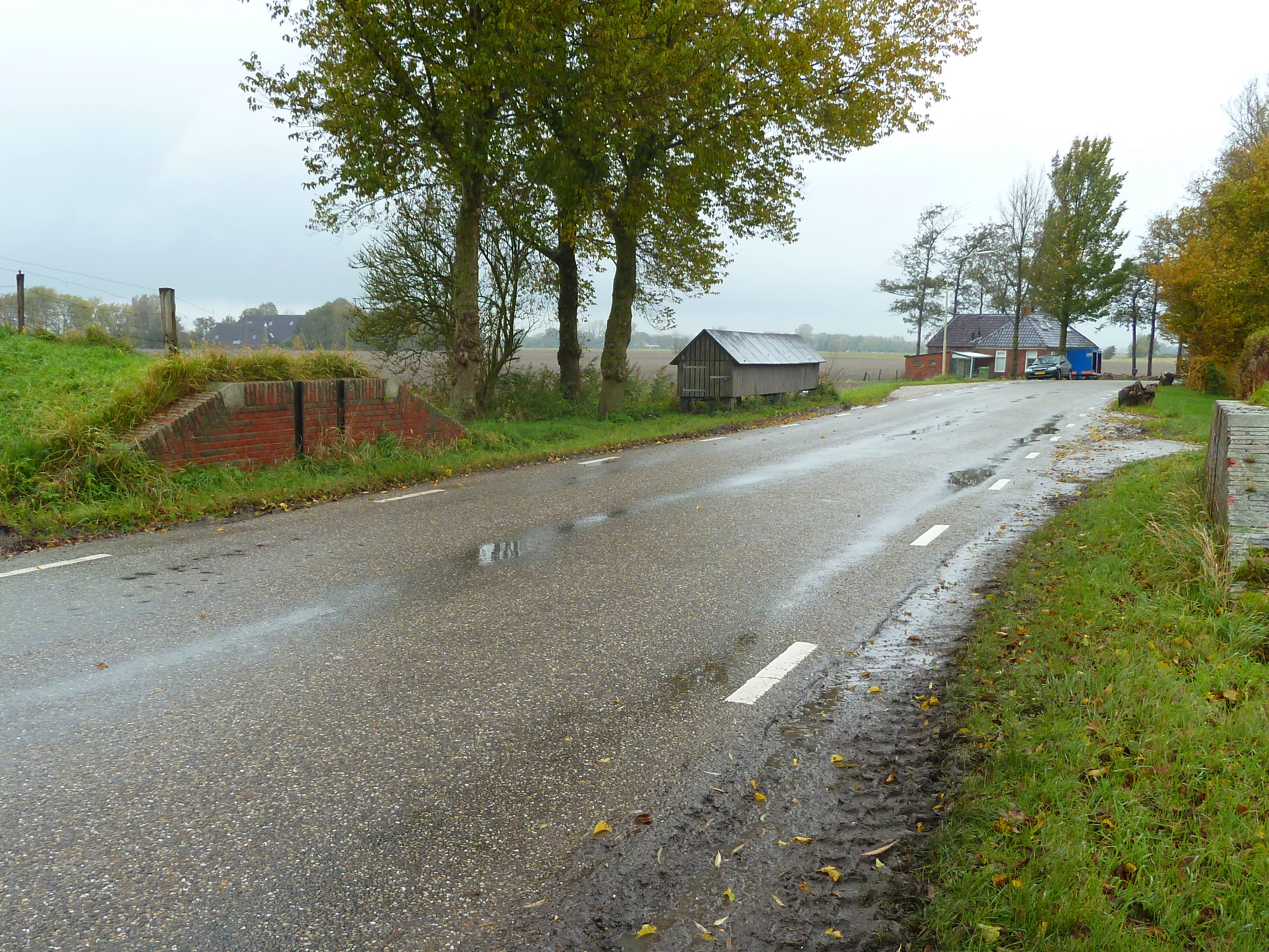 De coupure in de slaperdijk en het schotbalkhuisje bij Roodehaan.